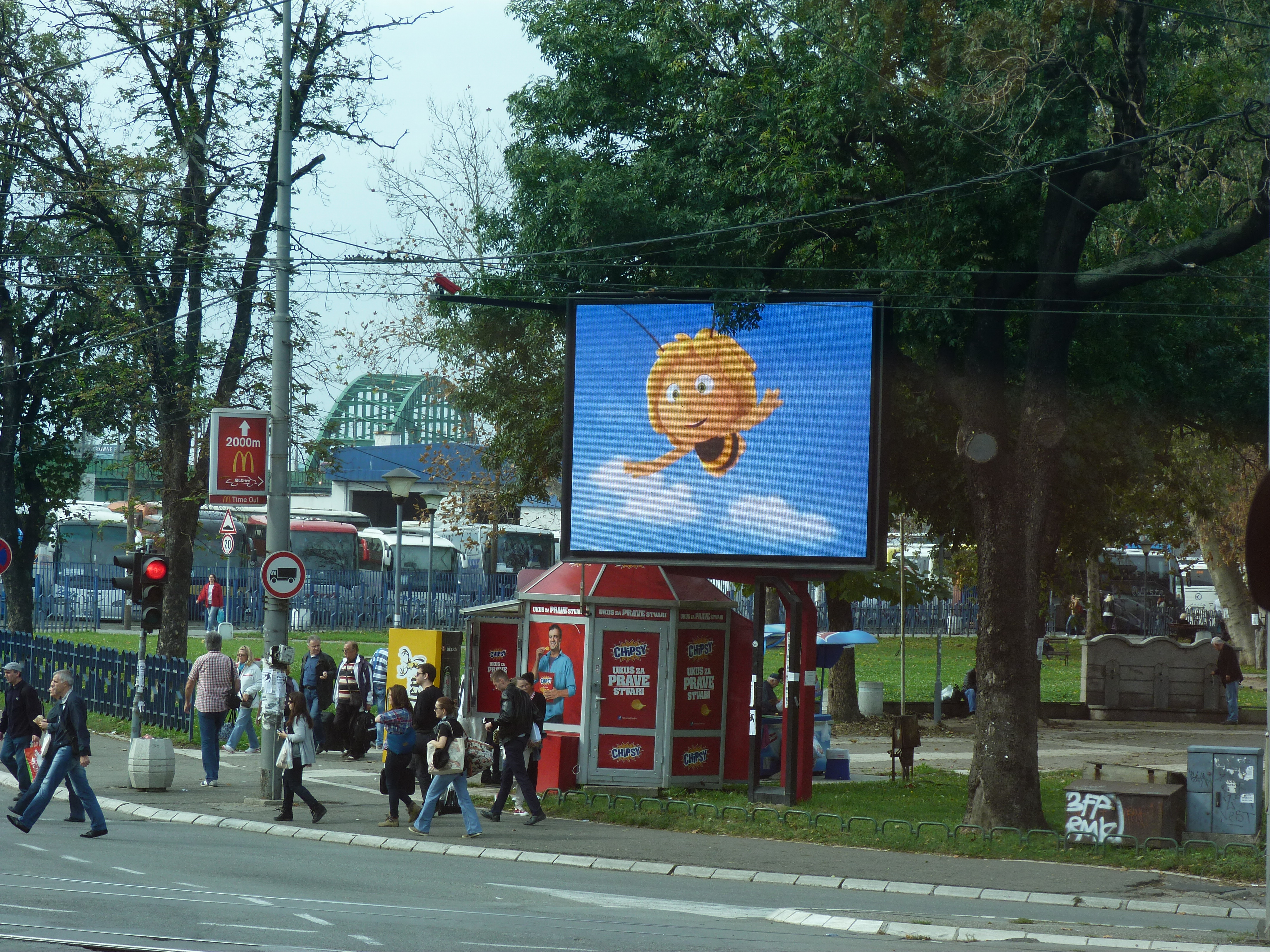 A felvétel 2014. október 21-én készült Nándorfehérváron. ©© Derzsi Elekes Andor, Budapest, 2014, A kép egészben, vagy részletekben másolását, bármilyen úton történő sokszorosítását és felhasználását a szerző ellenérték nélkül, jogutódjaira is kihatóan megengedi. Az engedély kiterjed a kereskedelmi célú hasznosításra is. Kéri azonban nevének feltüntetését a felhasználás során. A Metapolisz sorozat valamennyi képe és filmje Creative Commons alatti valamint kereskedelmi - for profit - célra is felhasználható. Ajánlott hivatkozás: Derzsi Elekes Andor: Metapolisz DVD line